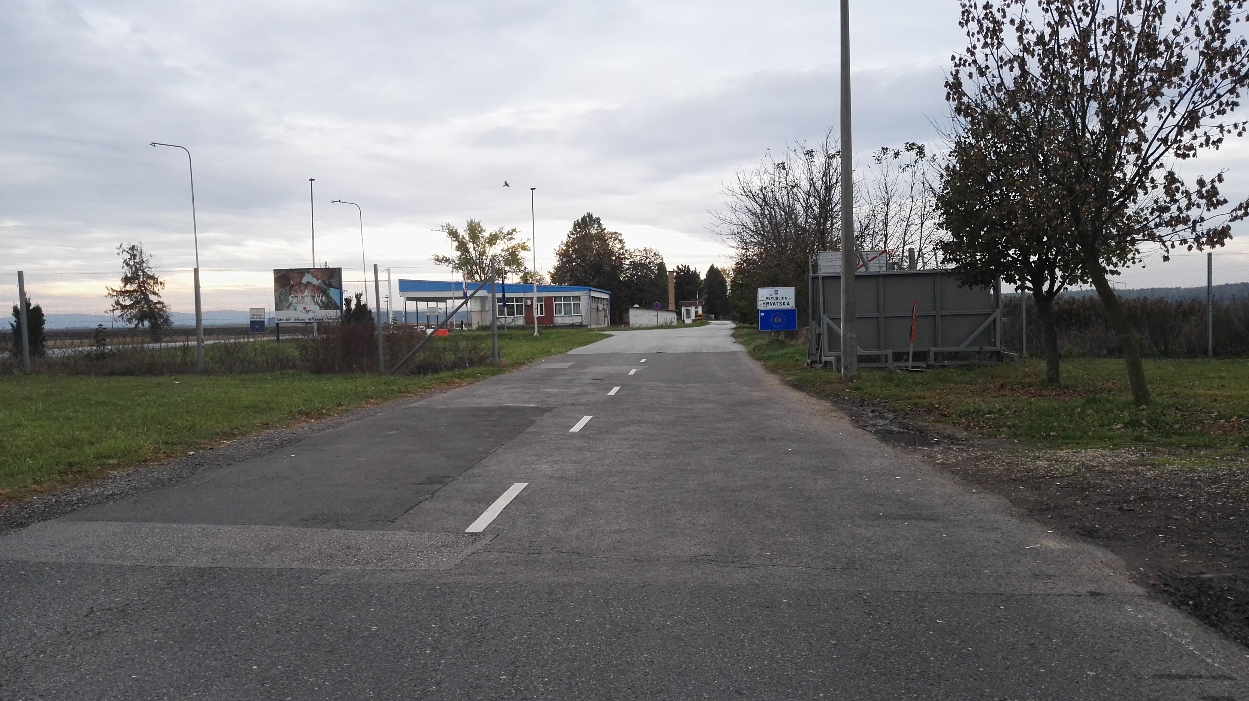 Duboševica határátkelő Udvarról nézve